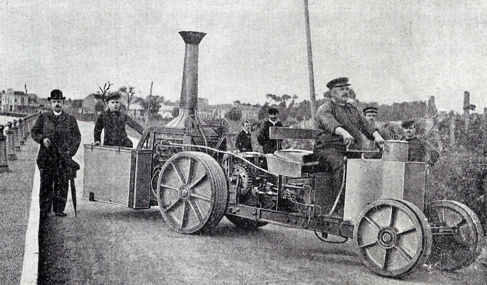 Edouard Rossel, Ingénieur constructeur Lille - Camions et locomotives à vapeur - affiche de l'exposition universelle de Paris 1900